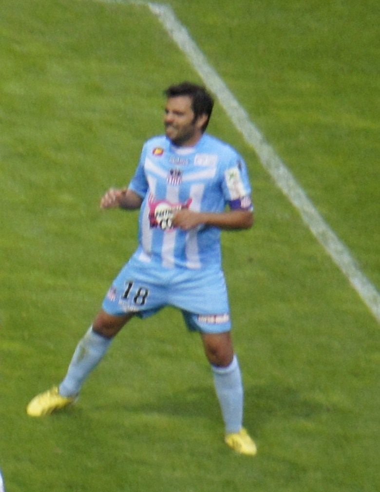 J. Cavalli en mai 2013.